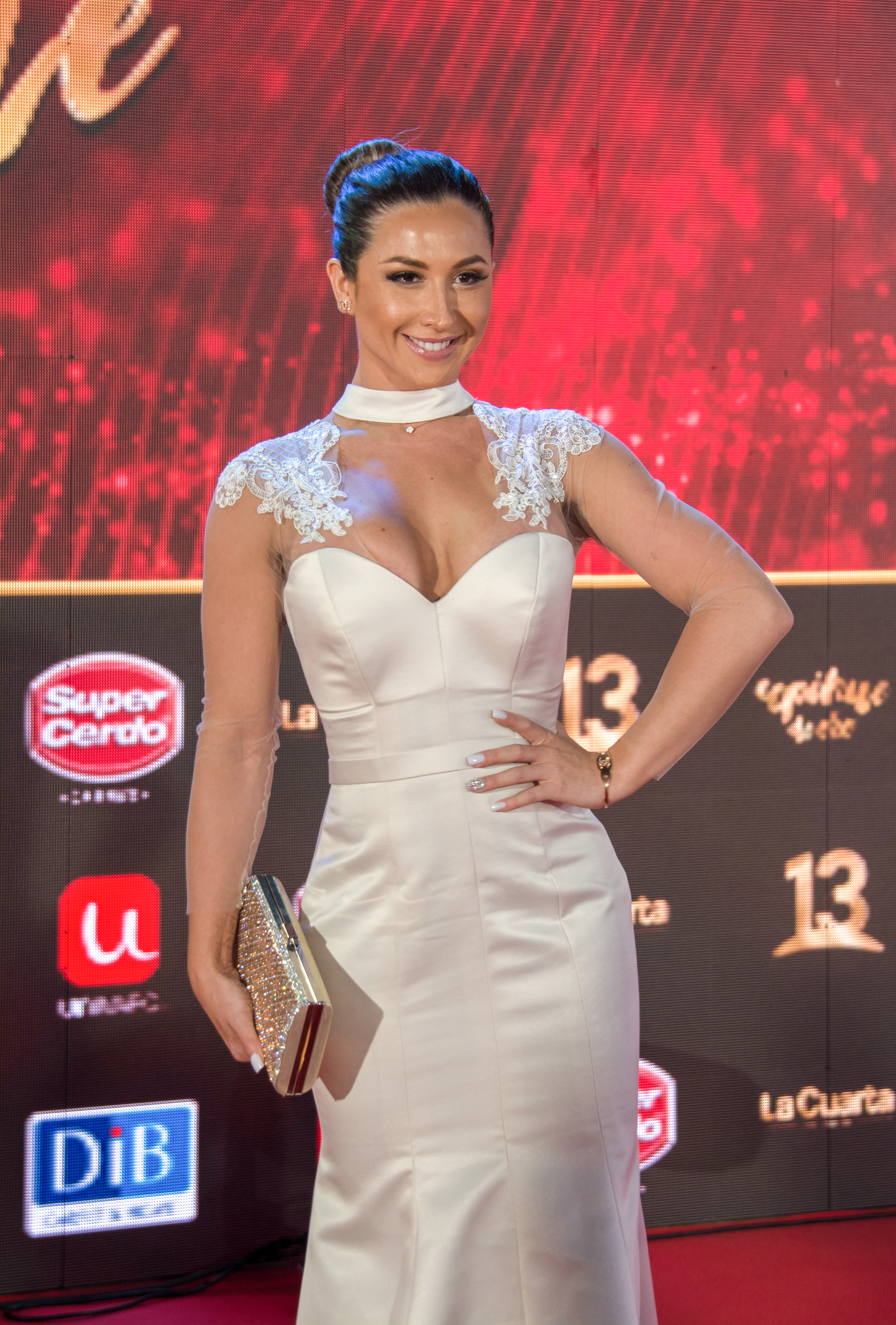 Nicole Moreno, Copihue de Oro 2018, Sun Monticello, Mostazal, Región de O'Higgins, Chile